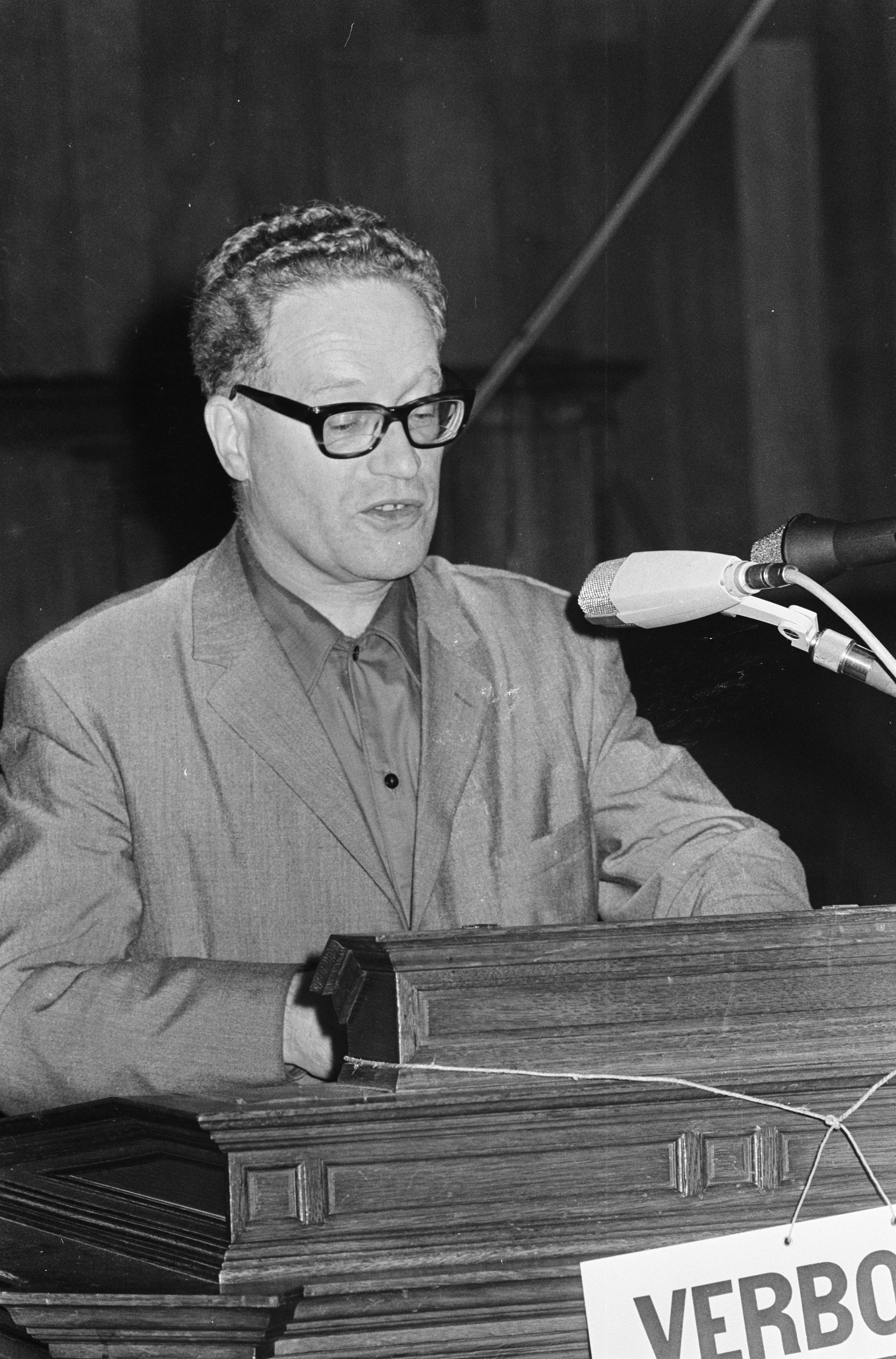 Collectie / Archief : Fotocollectie Anefo Reportage / Serie : [ onbekend ] Beschrijving : Robert Neild . Professor dr. B. Delfgauw Datum : 2 oktober 1967 Persoonsnaam : Neild, Robert, Professor Dr. B. Delfgauw Fotograaf : Kroon, Ron / Anefo Auteursrechthebbende : Nationaal Archief Materiaalsoort : Negatief (zwart/wit) Nummer archiefinventaris : bekijk toegang 2.24.01.05 Bestanddeelnummer : 920-7487